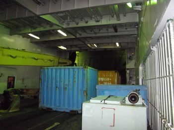 貨物船内部